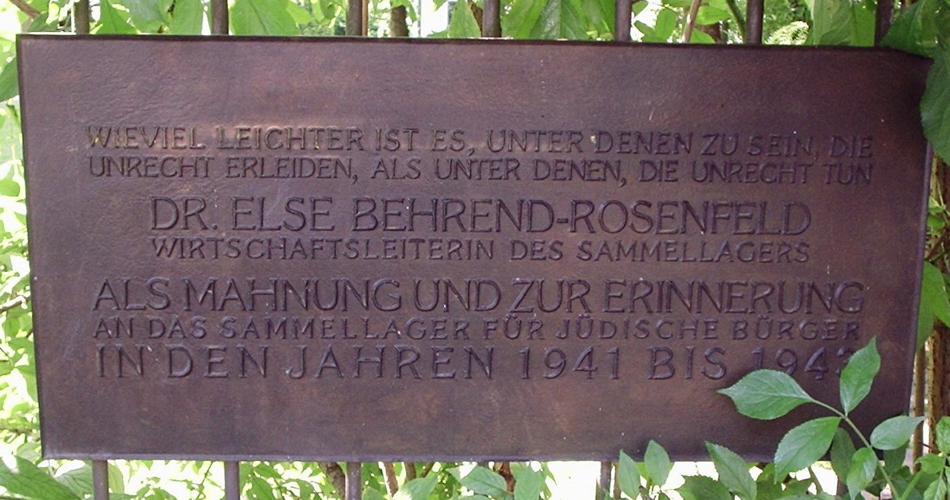 Gedenktafel für Else Rosenfeld in der Clemens-August-Straße, München.